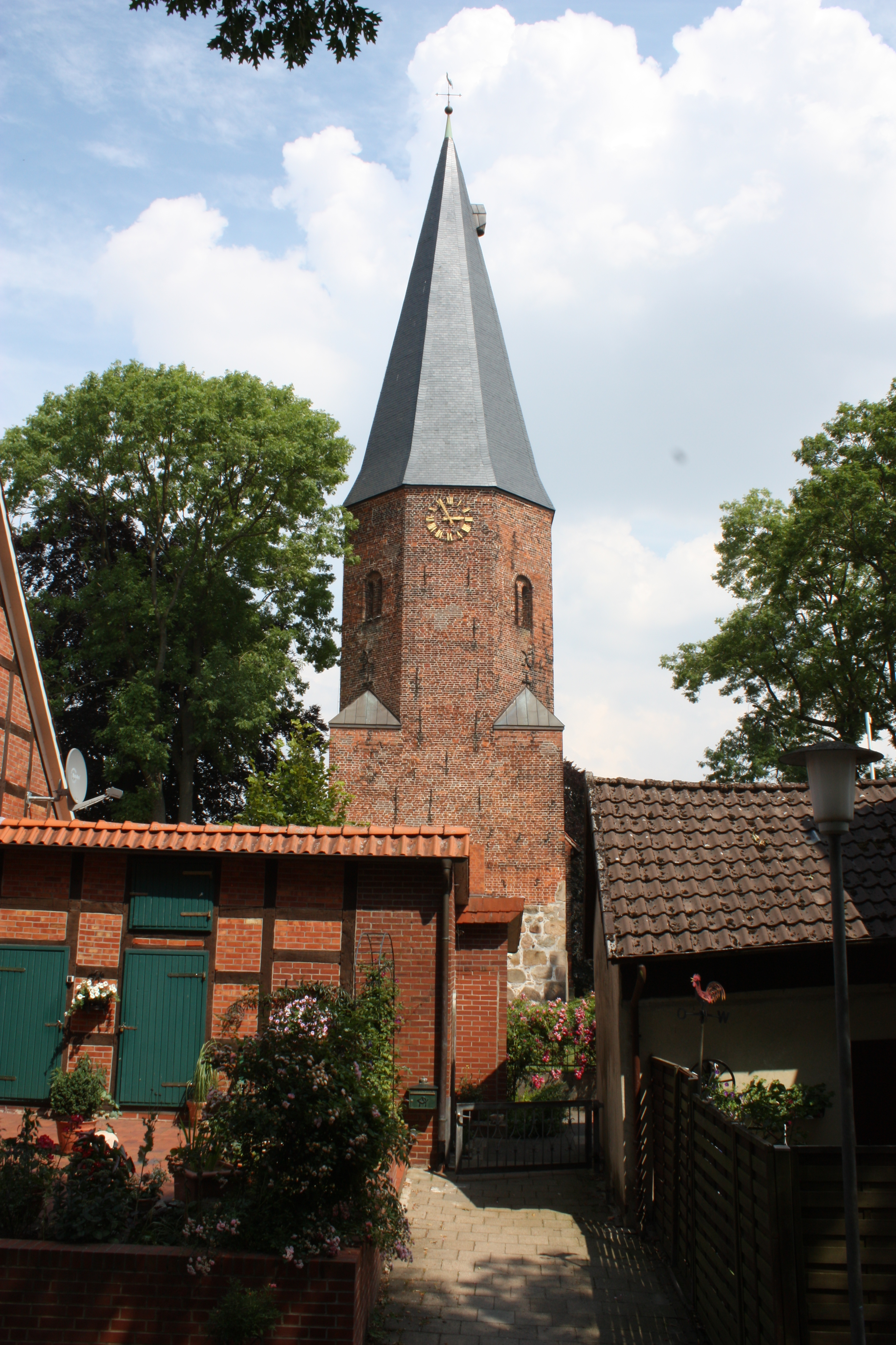 Barnstorf, Landkreis Diepholz, Niedersachsen